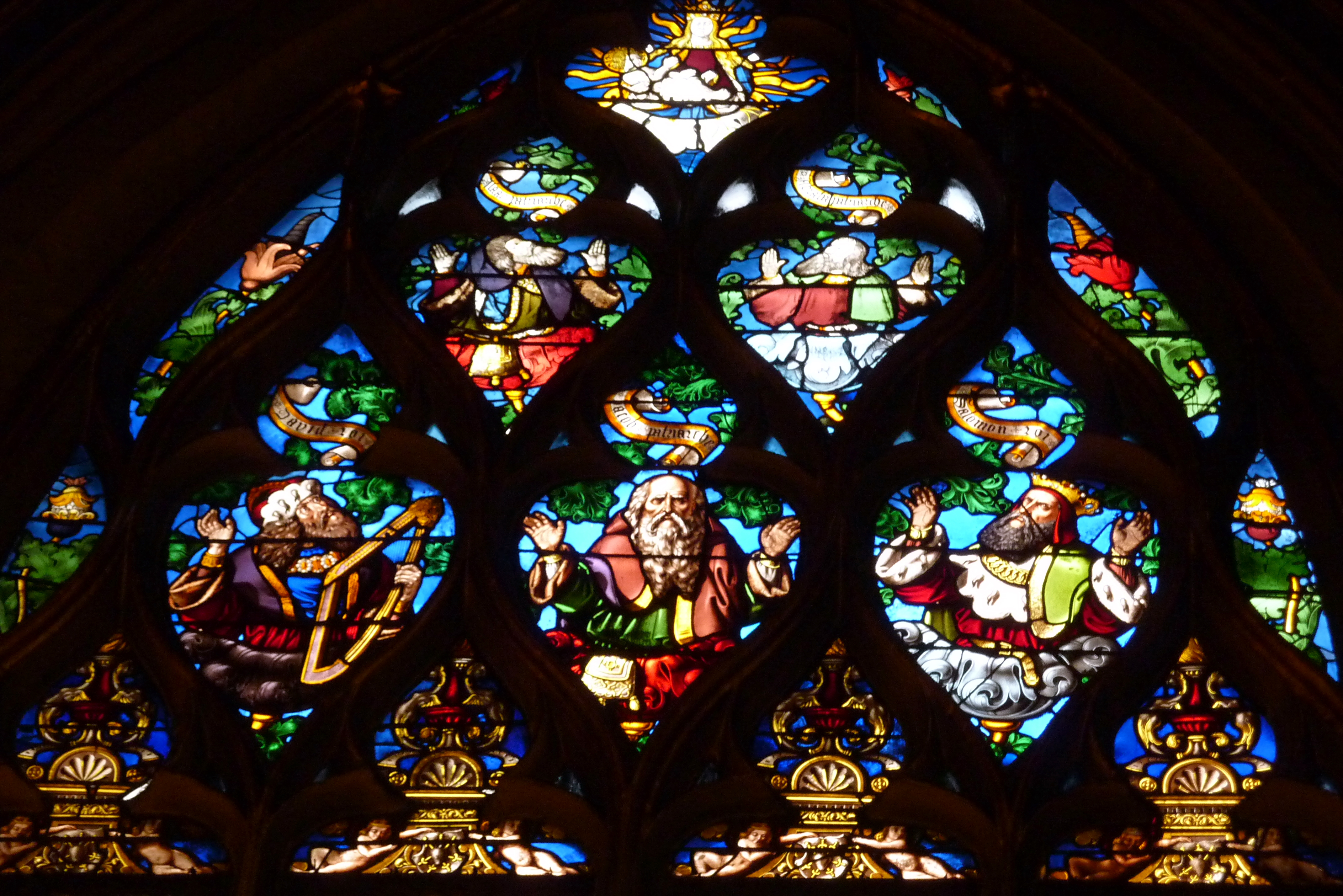 Ausschnitt eines Bleiglasfensters (Marienkapelle) in der Kirche St-Gervais-St-Protais in Paris, Darstellung: David, Jakob und Salomon